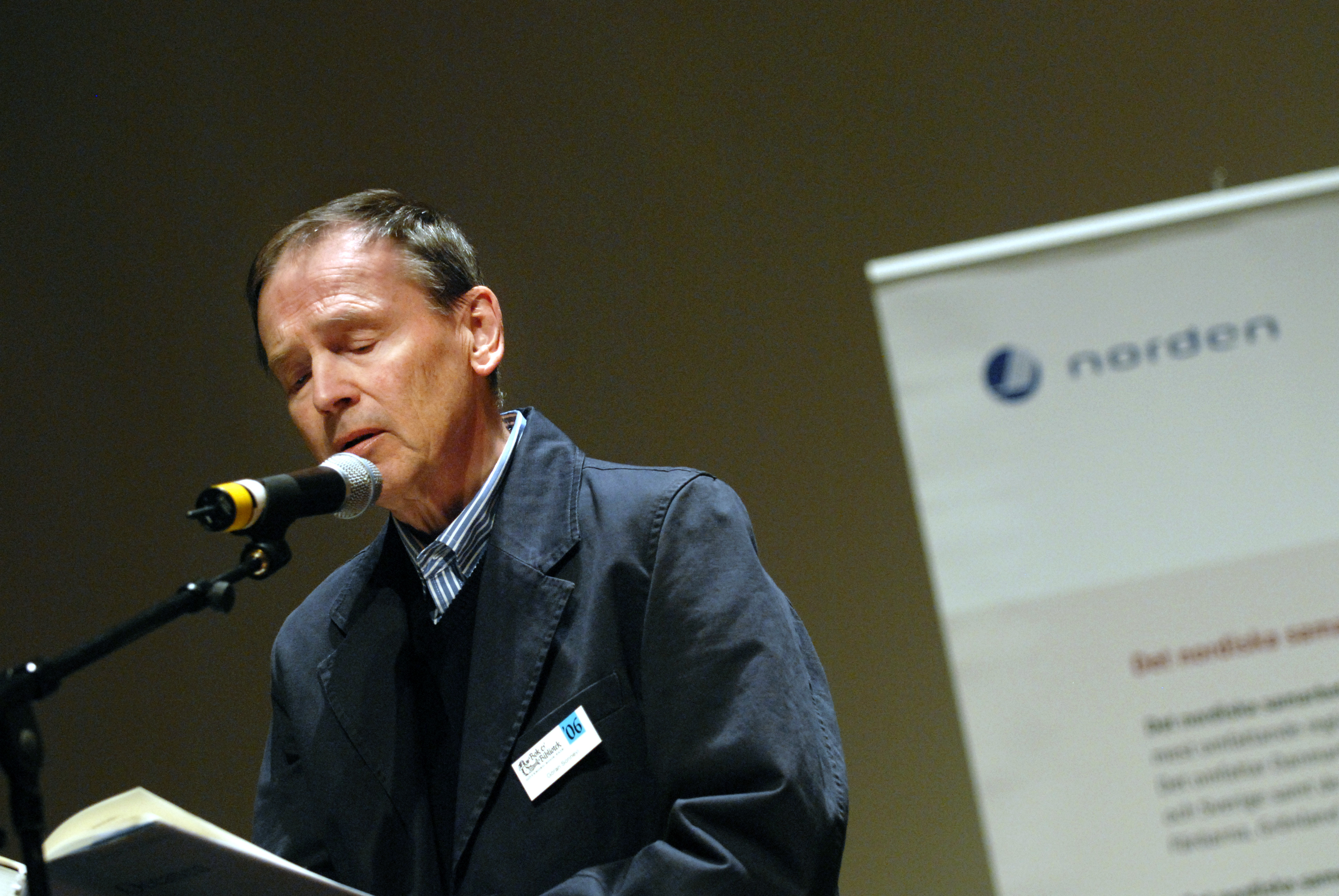 Göran Sonnevi, vinnare av Nordiska rådets litteraturpris läser ur sin bok Oceanen under bokmässan i Göteborg 2006.